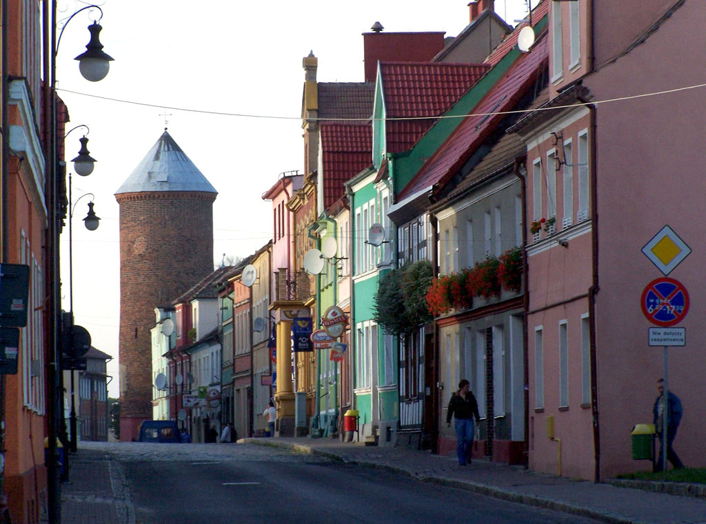 Fragment zabudowy rynkowej Maszewa z Baszta Francuską w tle